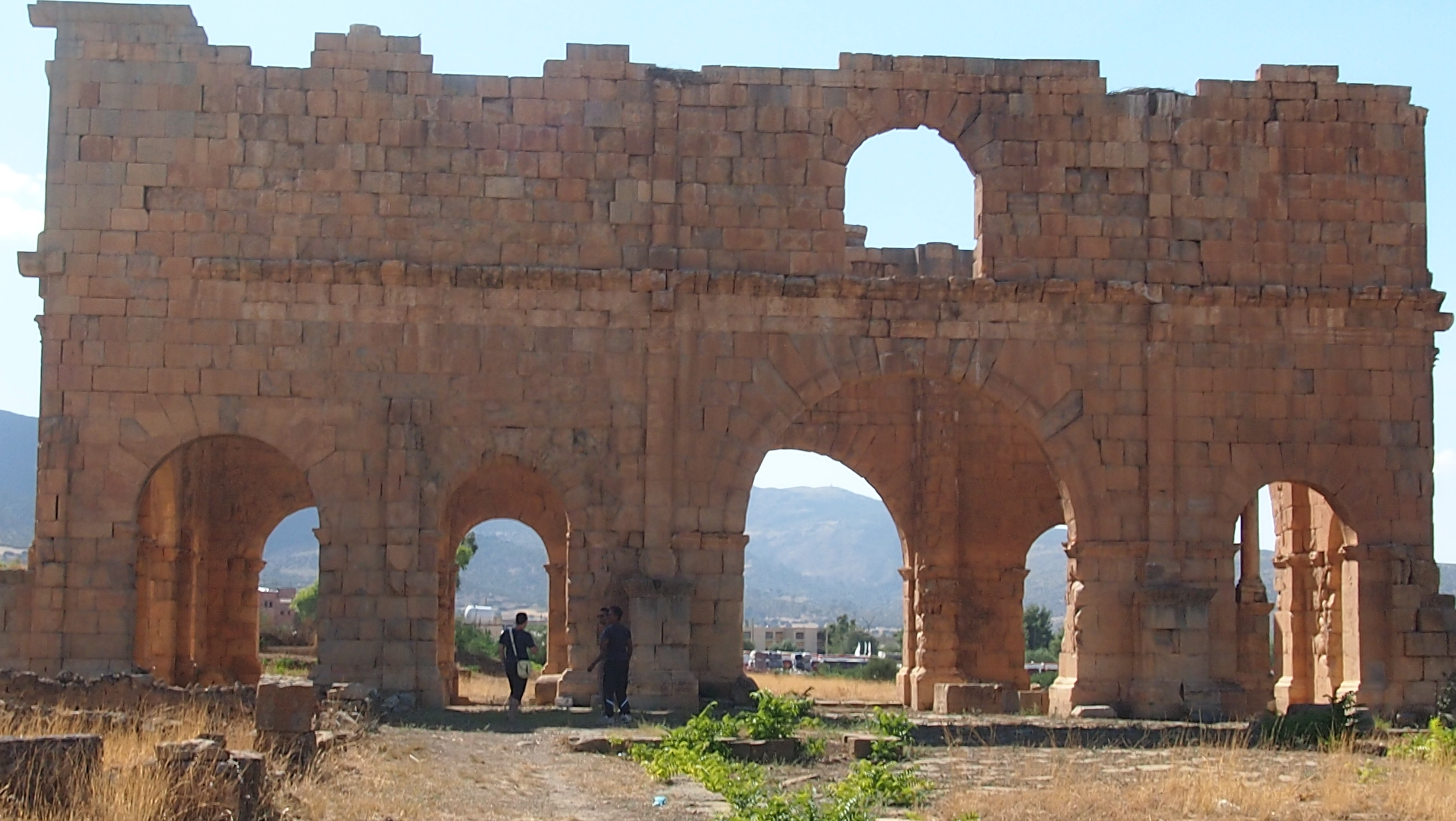 Territoires et monuments de l'antique Lambaesis